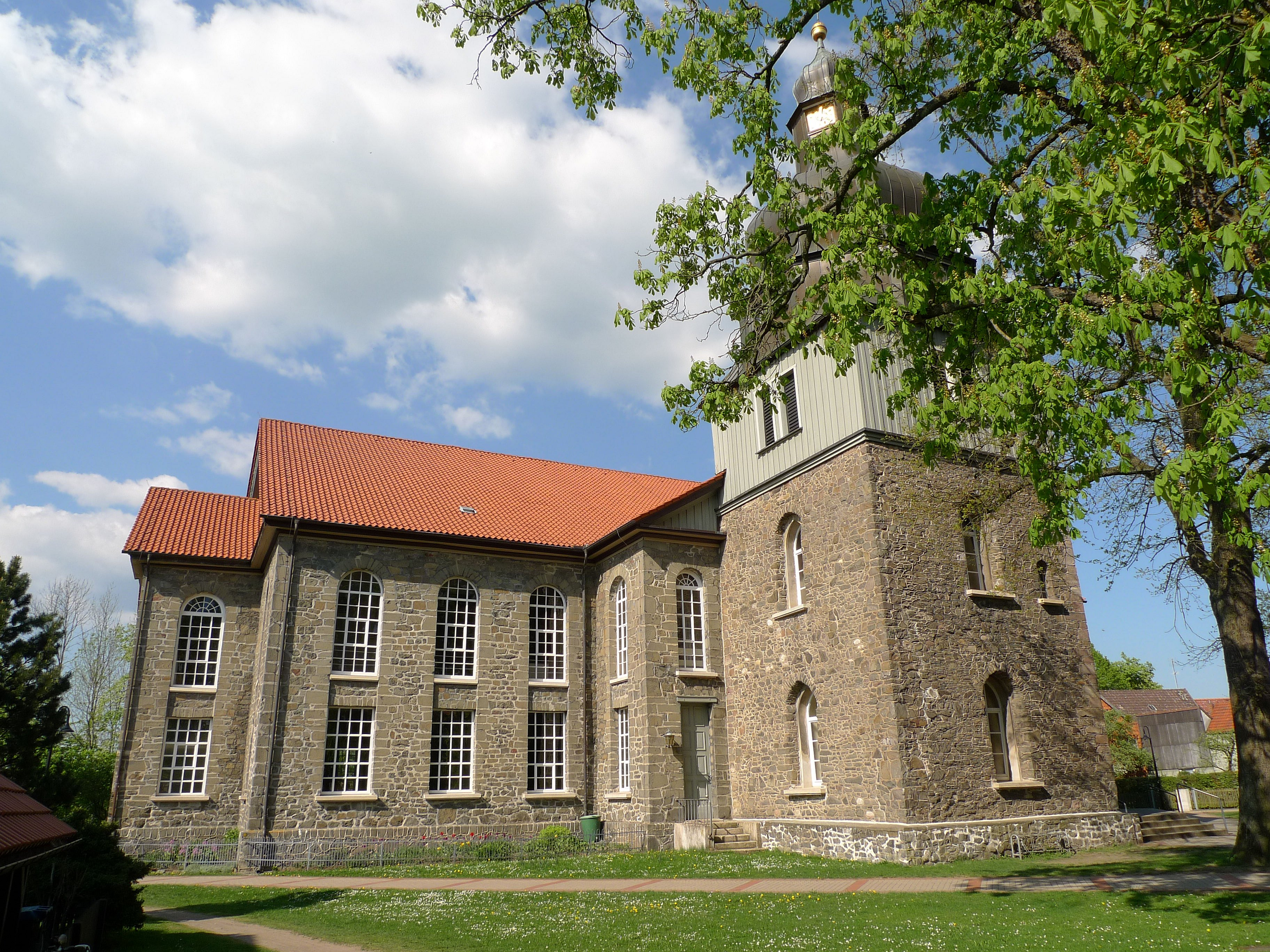 St. Nicolai Kirche in Herzberg am Harz